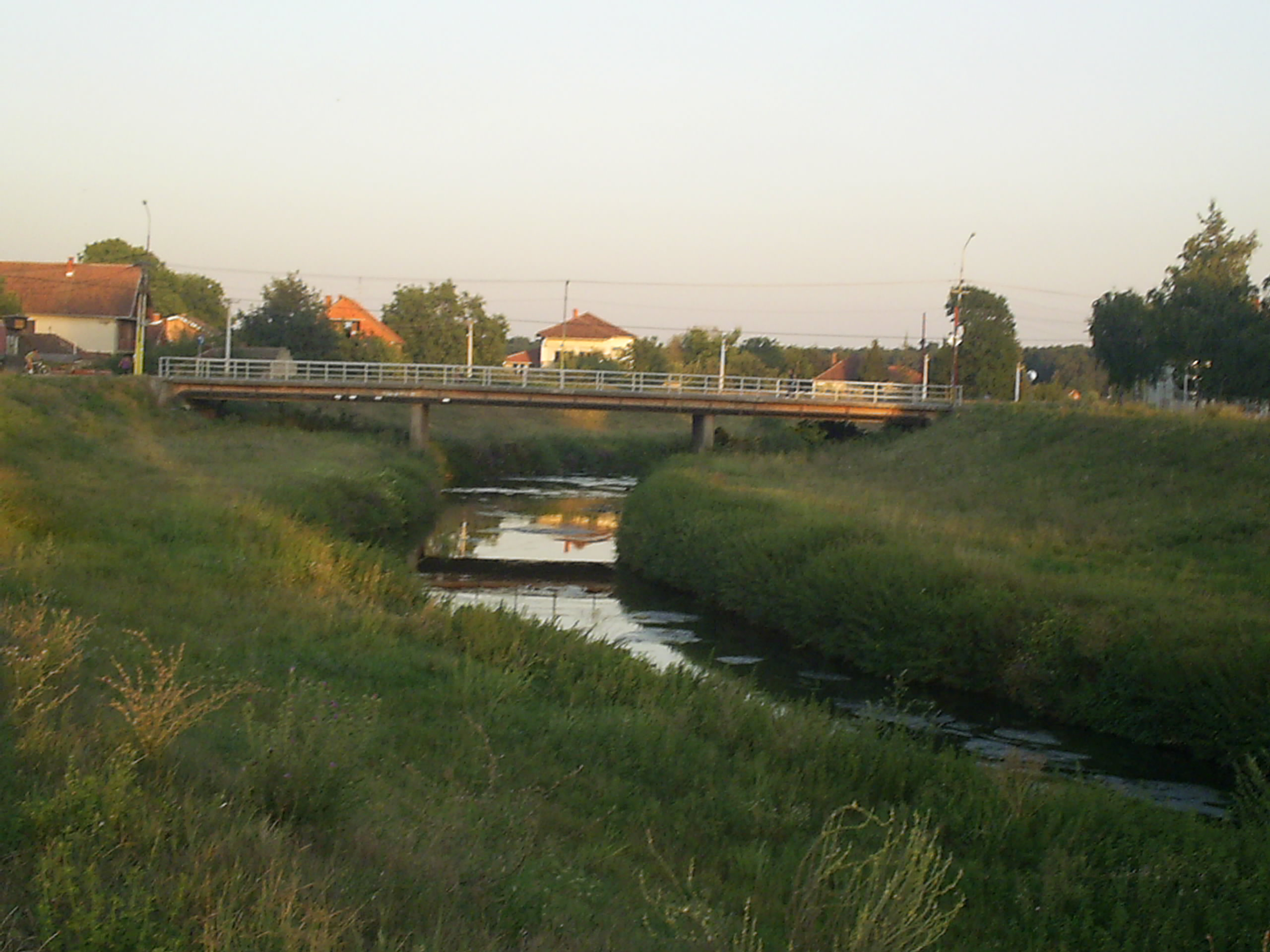 Река Лепеница у Баточини }